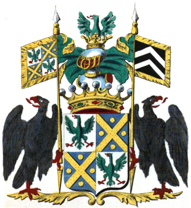 Armoiries de la famille van Hoobrouck d'Aspre